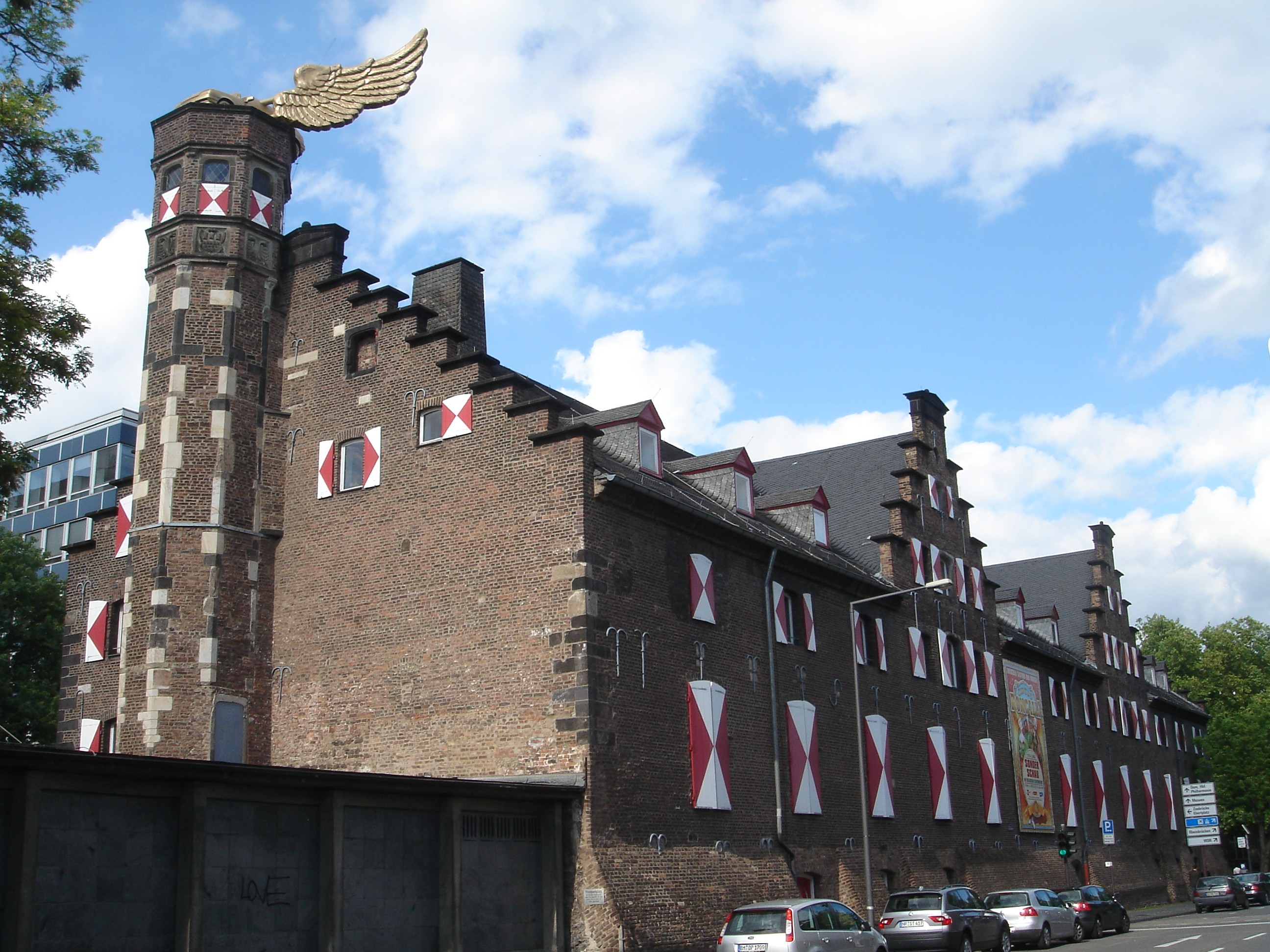 Das Zeughaus in Köln, Standort des kölnischen Stadtmuseums. Auf dem Dach die umstrittene Flügelauto-Skulptur von H. A. Schult.